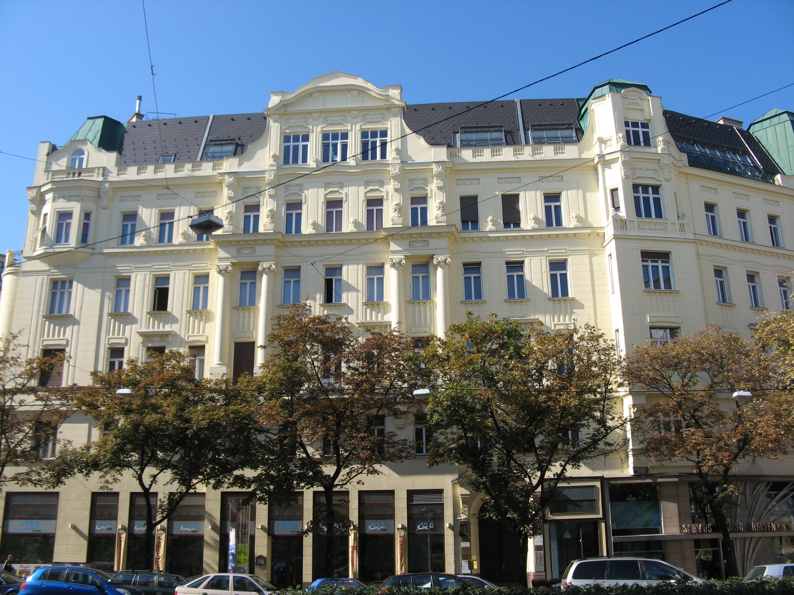 Haus (1911) von Fritz Bretschneider, Favoritenstraße 4-6, Wien-Wieden